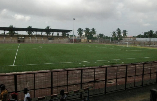 Le Stade Robert Champroux est un stade en Côte d'Ivoire qui sert pour le football, le rugby, les concerts et les meetings. Il se situe dans le quartier de Marcory à Abidjan. Avec sa structure ovale, ses gradins cohabitant avec des palmiers, il peut accueillir plus de 20 000 spectateurs assis. C'est le plus grand stade de la capital après le Stade Félix Houphouët-Boigny (50 000 places)